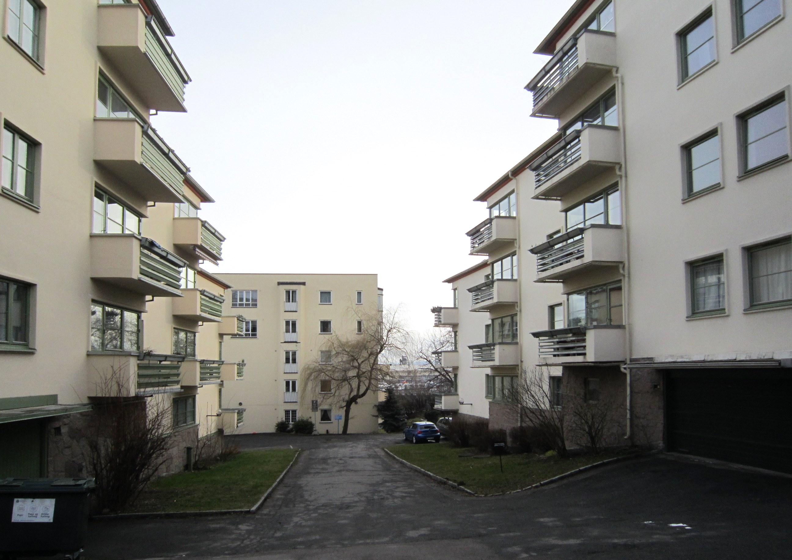 Framnes terrasse i Oslo